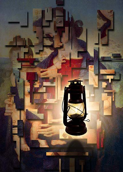 Benedek Imre (Budapest, 1972. február 22.) alkalmazott grafikus alkotása.